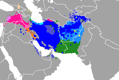 Lenguas iranias